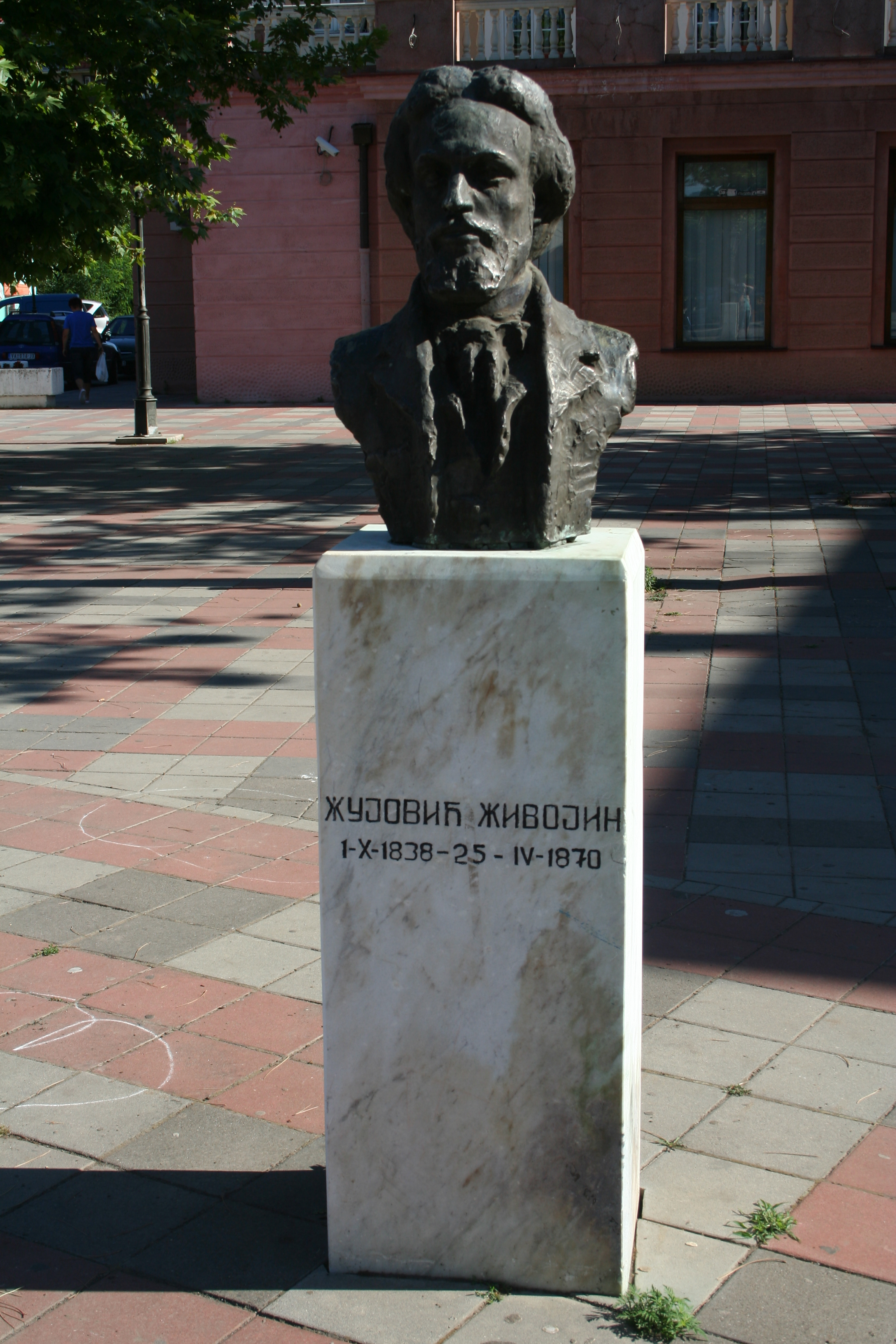 Lajkovac